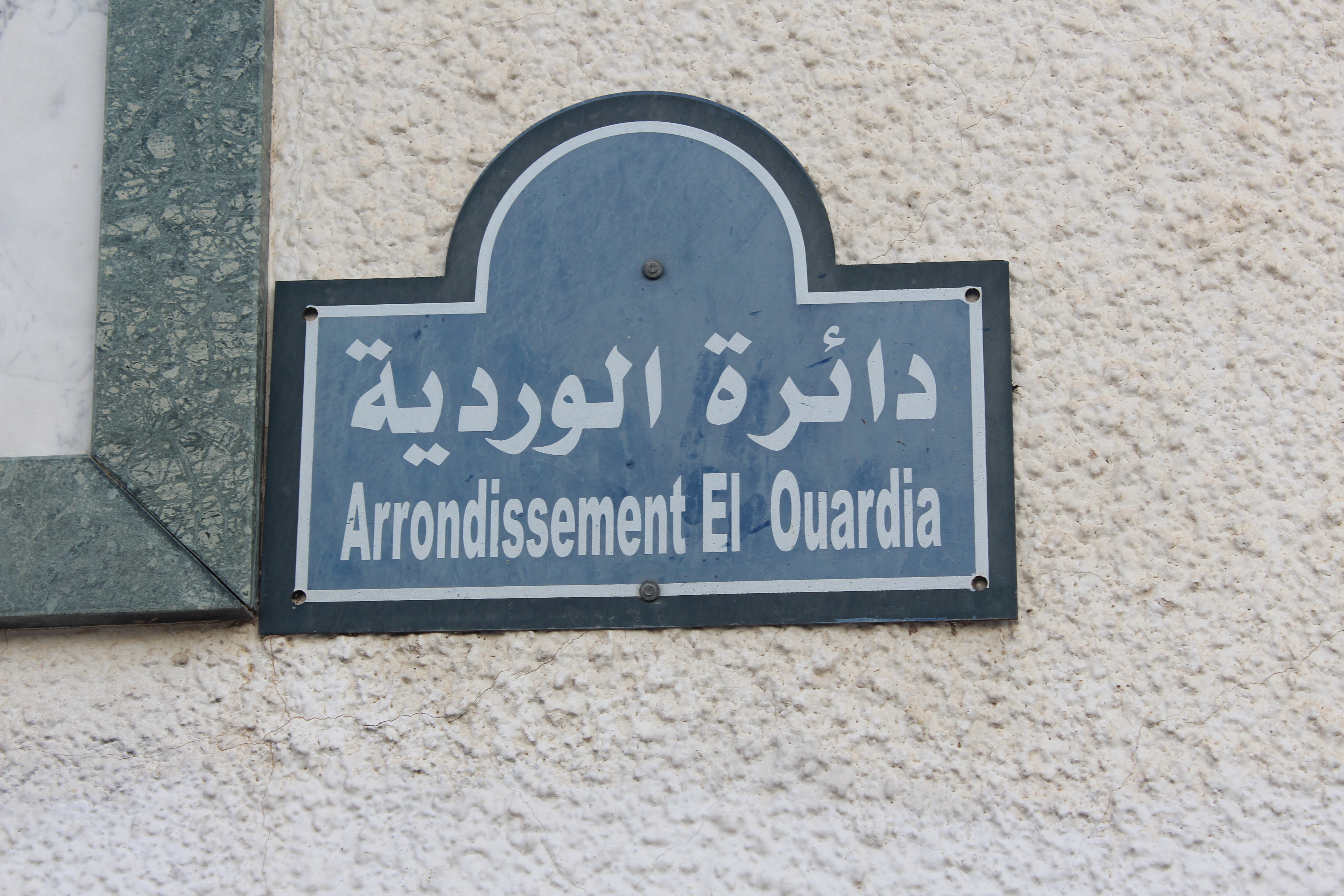 El Ouardia est un arrondissement qui appartient à la municipalité de Tunis .